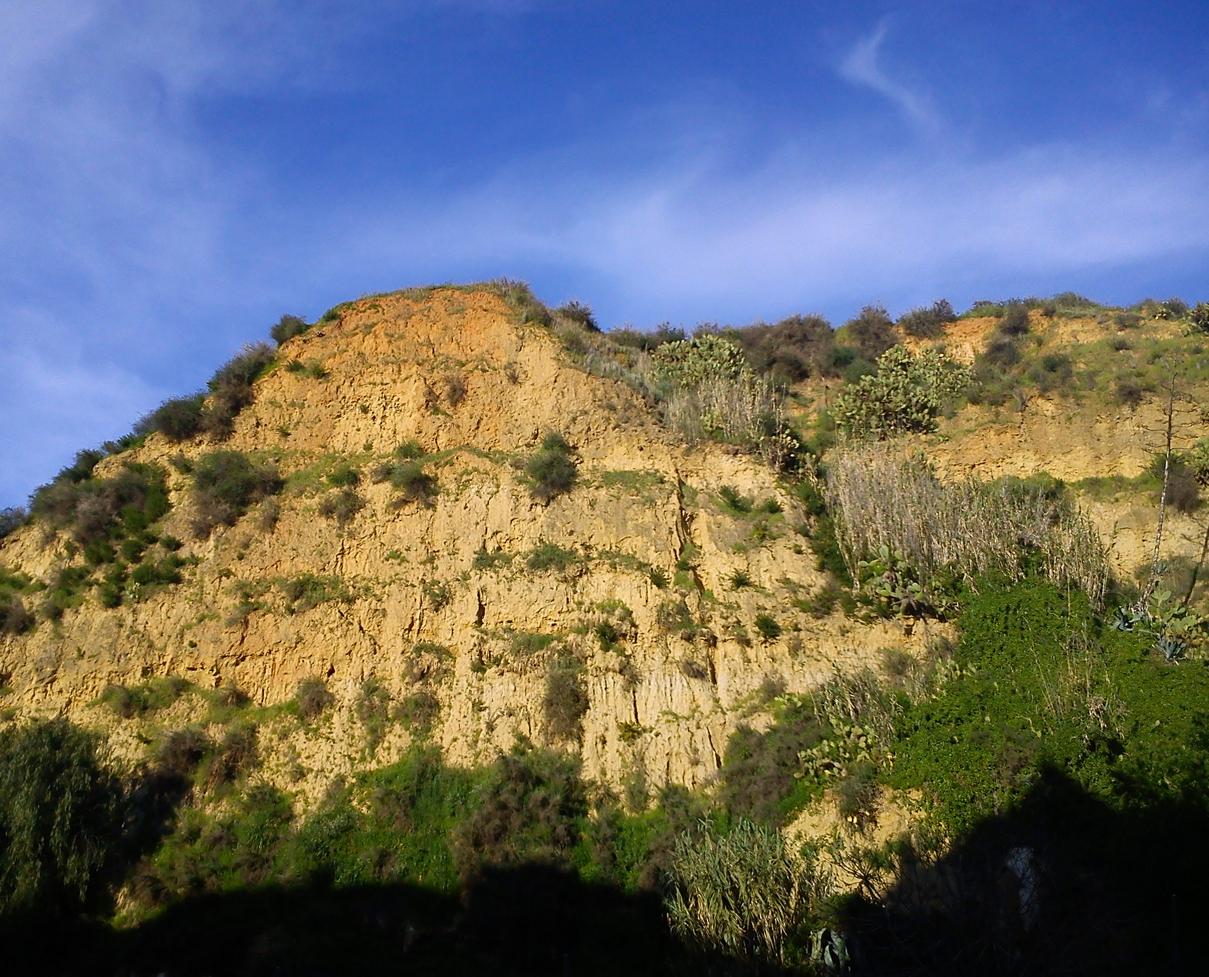 Cabezo es una elevación orográfica, un cerro de gran altura.